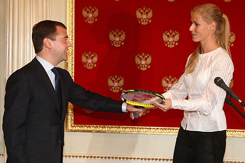 Dmitry Medvedev and Elena Dementieva